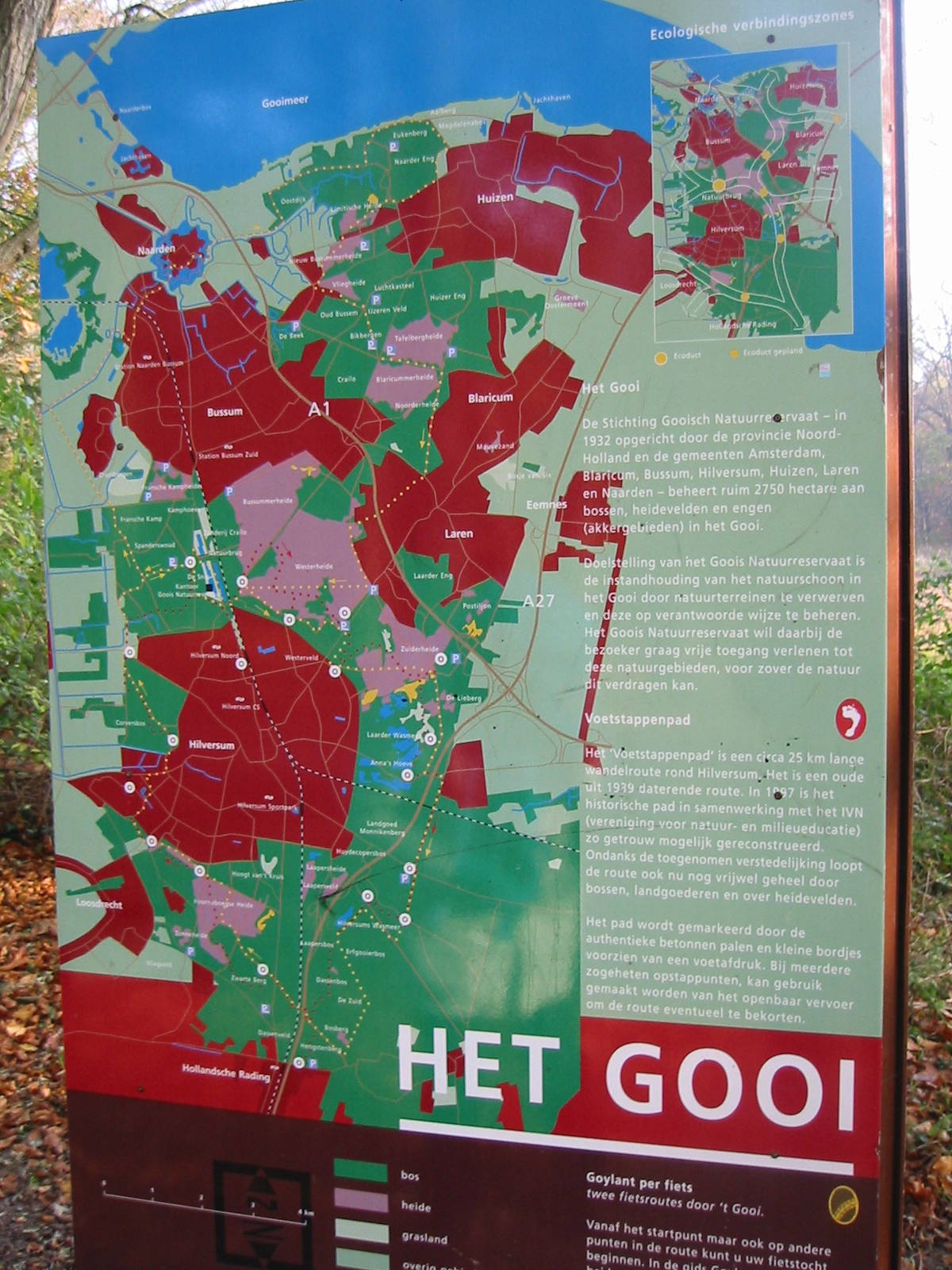 Le Gooi